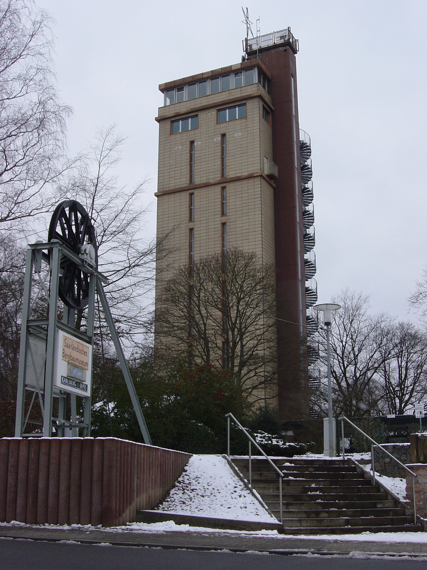 Hindenburgturm, Saarländisches Bergbaumuseum, Niederbexbacher Straße, 66450 Bexbach